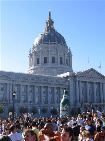 Парад на любовта в Сан Франциско, провел се на 24.ІХ.2005 г. пред Сивик сентър, сградата на община Сан Франциско. (авторска снимка)